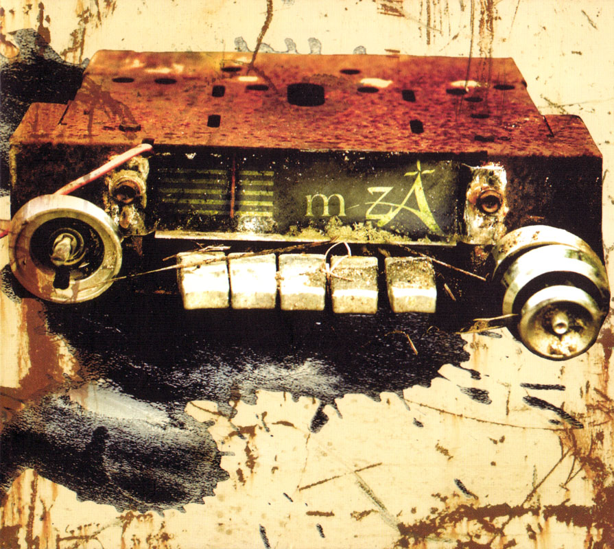 m-zA "m-zA" - 2005